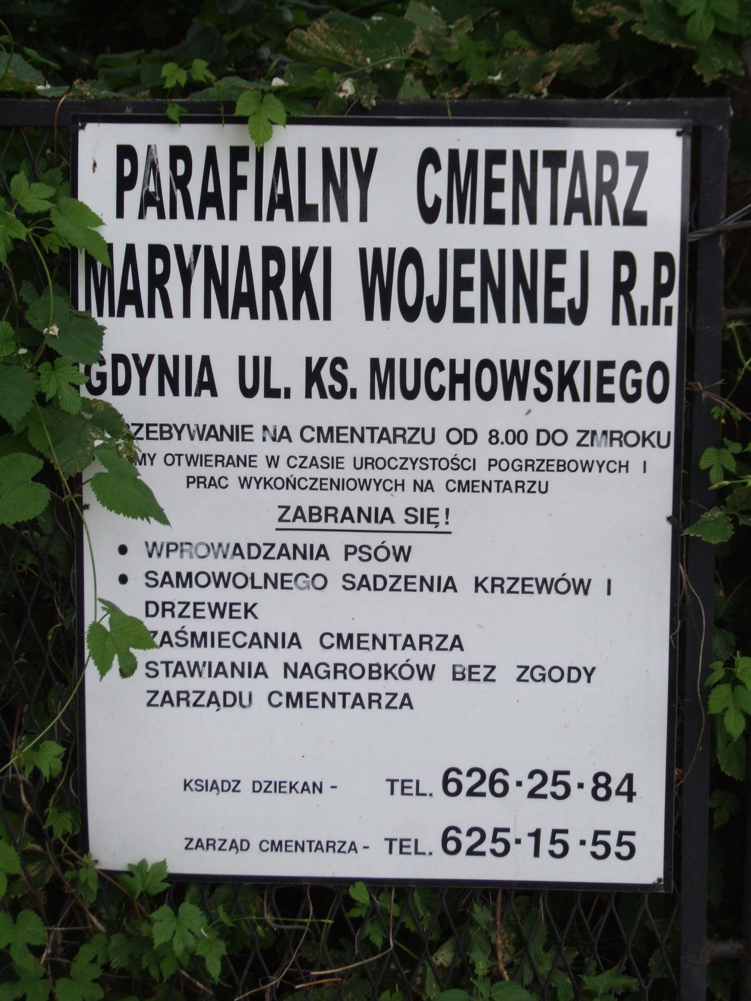 Gdynia-Oksywie Cmentarz Marynarki Wojennej